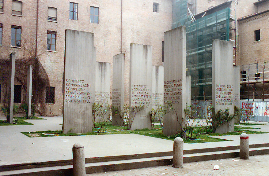 Cortile delle stele nel Museo Monumento al Deportato politico e razziale a Carpi.